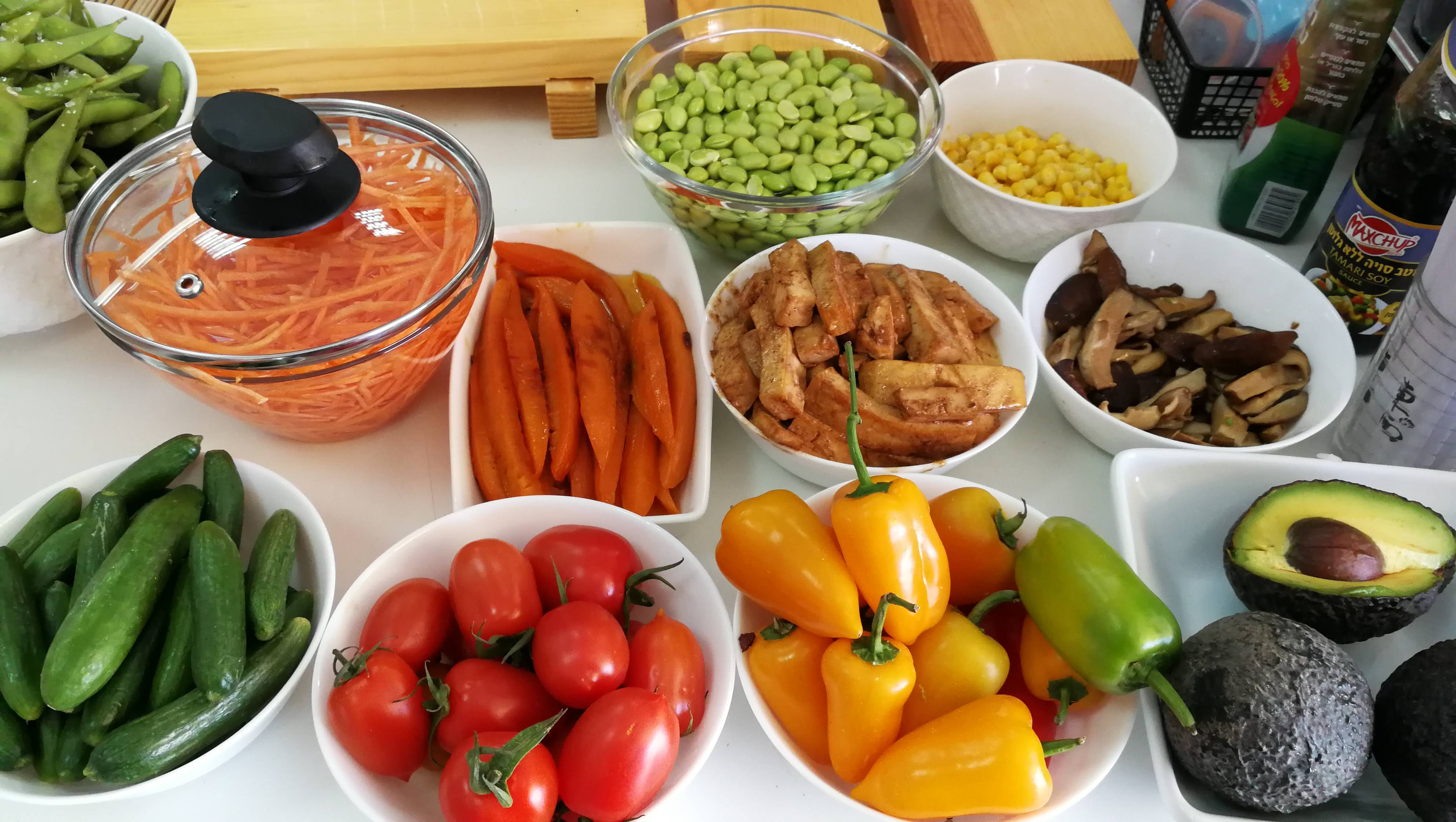 מרכיבים שונים לקופסת בנטו, זכרון יעקב, ישראל, 2019